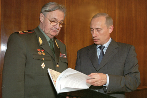 НОВО-ОГАРЕВО. С председателем Ассоциации Героев Советского Союза, Российской Федерации, кавалеров орденов Славы и членом попечительского совета Всероссийского военного национального фонда Валентином Варенниковым.